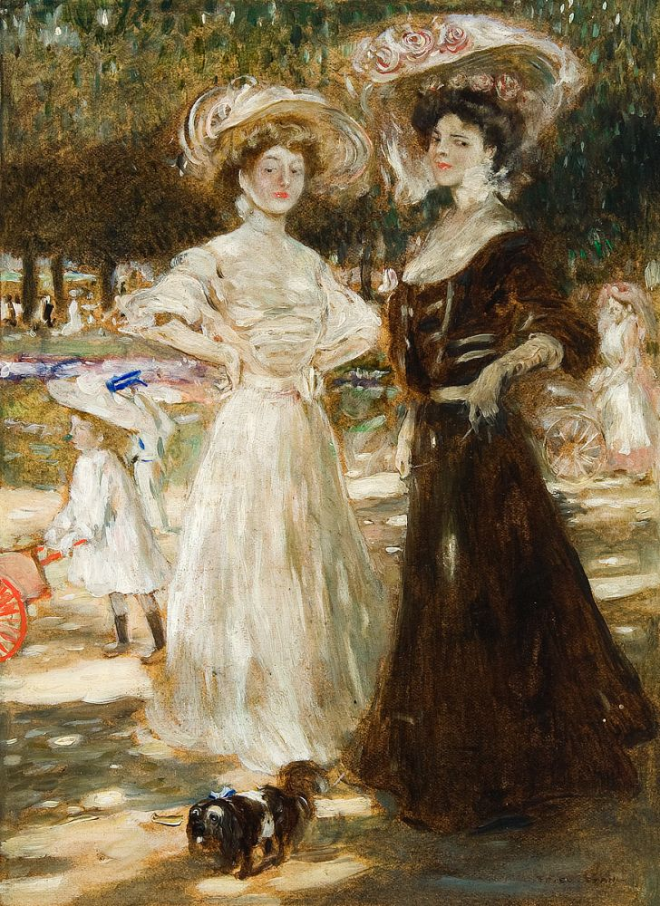 Damen im sommerlichen Park. Öl auf Malpappe. 236 x 170 mm. Signiert.